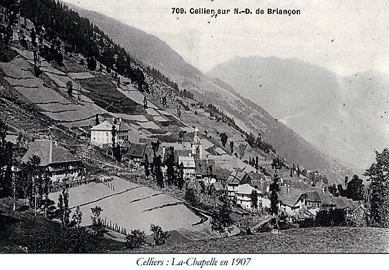 Chapelle en 1907 avec clocher à bulbe.